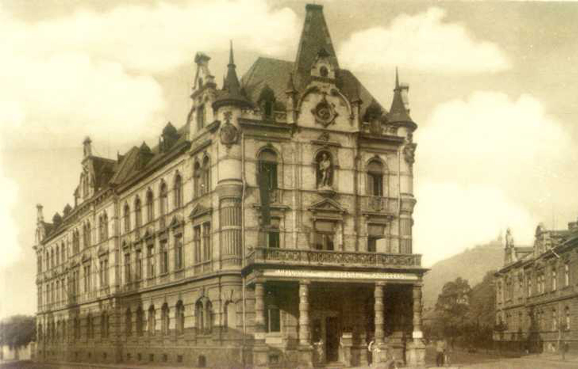 Revírní bratrská pokladna v Mostě, později poliklinika, ještě později knihovna.